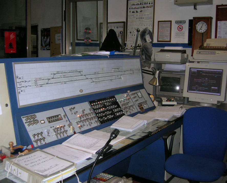 Banco ACEI e Ufficio Movimento di una piccola stazione sulla linea Padova - Bologna Author: C. Pagliarini, Italy. Presented to Horatius for Commons